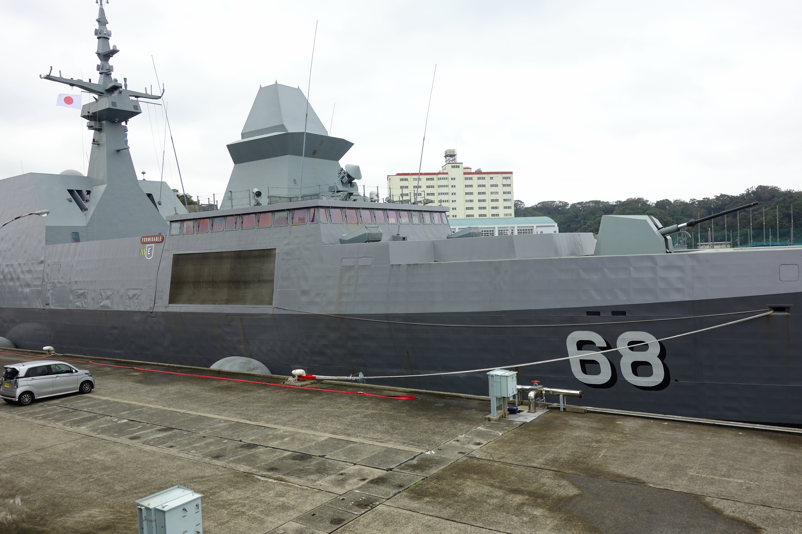 令和元年の観艦式に参加するために海上自衛隊横須賀基地に寄港した、シンガポール海軍のフォーミダブル級フリゲート1番艦のフォーミダブル。令和元年台風第19号のため観艦式は中止となり、横須賀基地での艦艇一般公開のみとなった。フォーミダブルは一般公開はされず、外観のみの展示であった。徹底したステルス対策が施された船体が分かる。オート・メラーラ 76 mm 砲もステルス化されている。